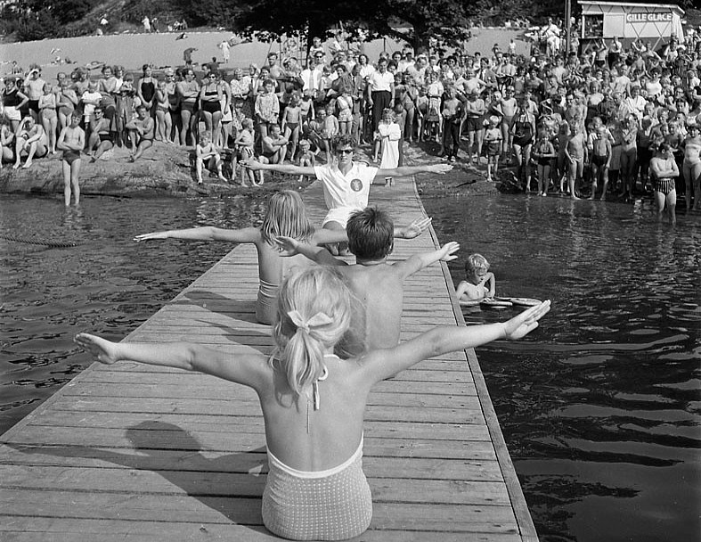 Flatenbadet i Stockholm 1957